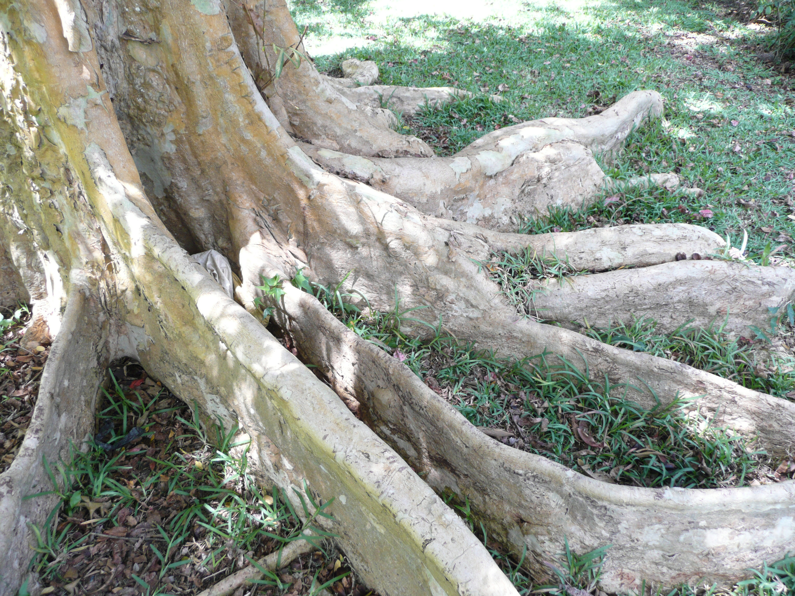 Terminalia arjuna in Sir Seewoosagur Ramgoolam Botanical Garden Map: 20° 6' 25" S 57° 34' 46" E